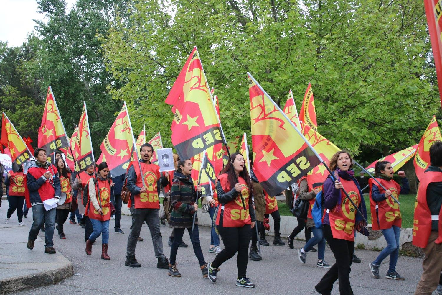 odtü